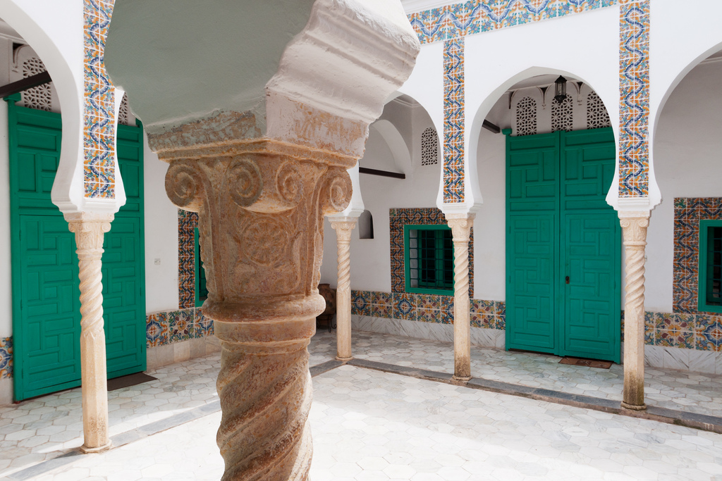 1715, c’est la date supposée de fondation de Dar Abdellatif, qui aura connu jusqu’à sa réquisition par l’armée française, nombre de propriétaires. Le dernier propriétaire algérien, Sieur Abdellatif, lui laissera par ailleurs son nom. La villa a accueilli une centaine de peintres et d’artistes du monde entier, avant d’être l’objet d’une restauration de 2006 à 2008. Depuis, le lieu retrouve une seconde vie grâce à des résidences d’artistes, des expositions, tout en abritant tout au long de l’année le siège social de l’Agence Algérienne pour le Rayonnement Culturel (AARC).